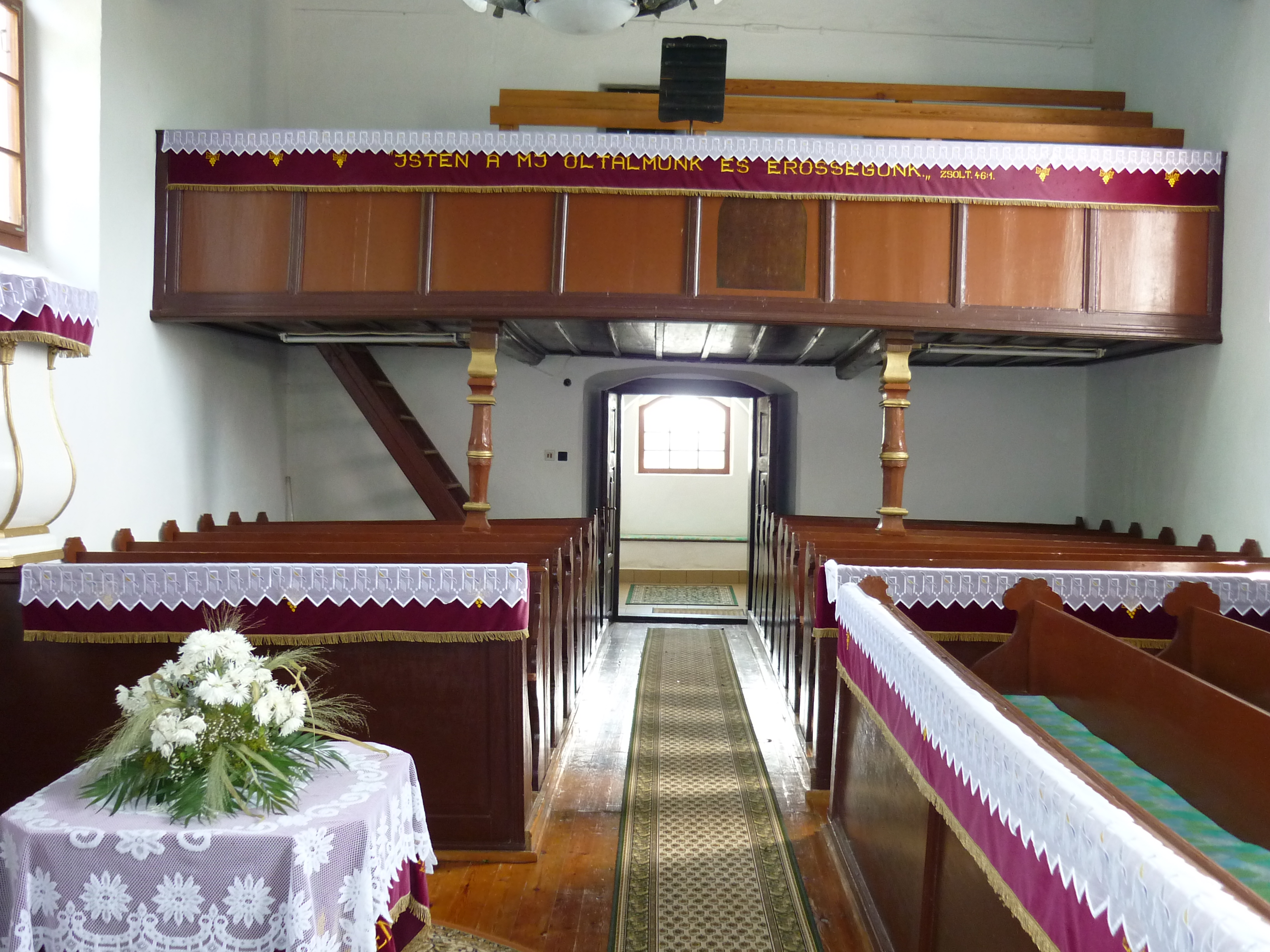 A trizsi református templom bútorzata